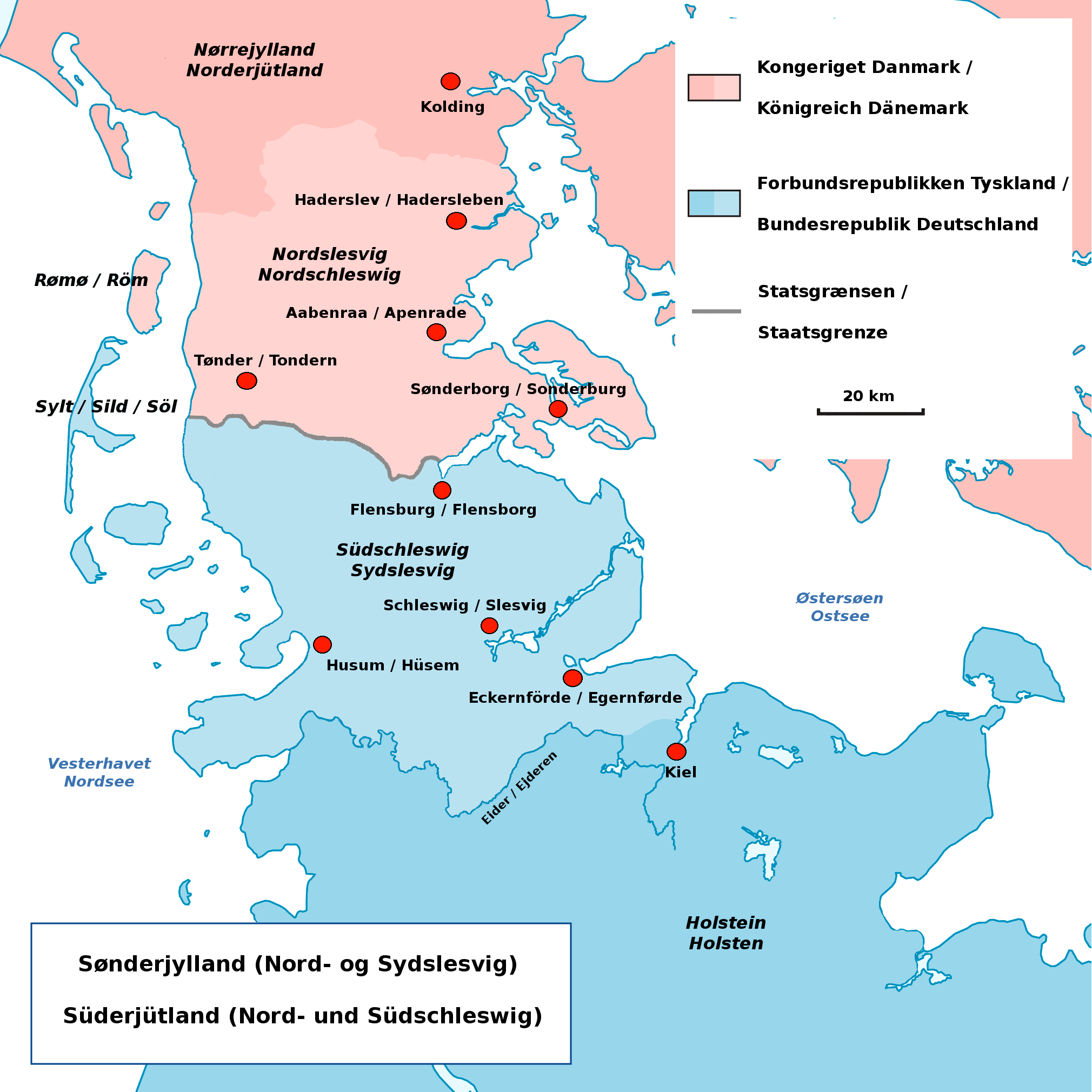 Sønderjylland (Nord- og Sydslesvig)